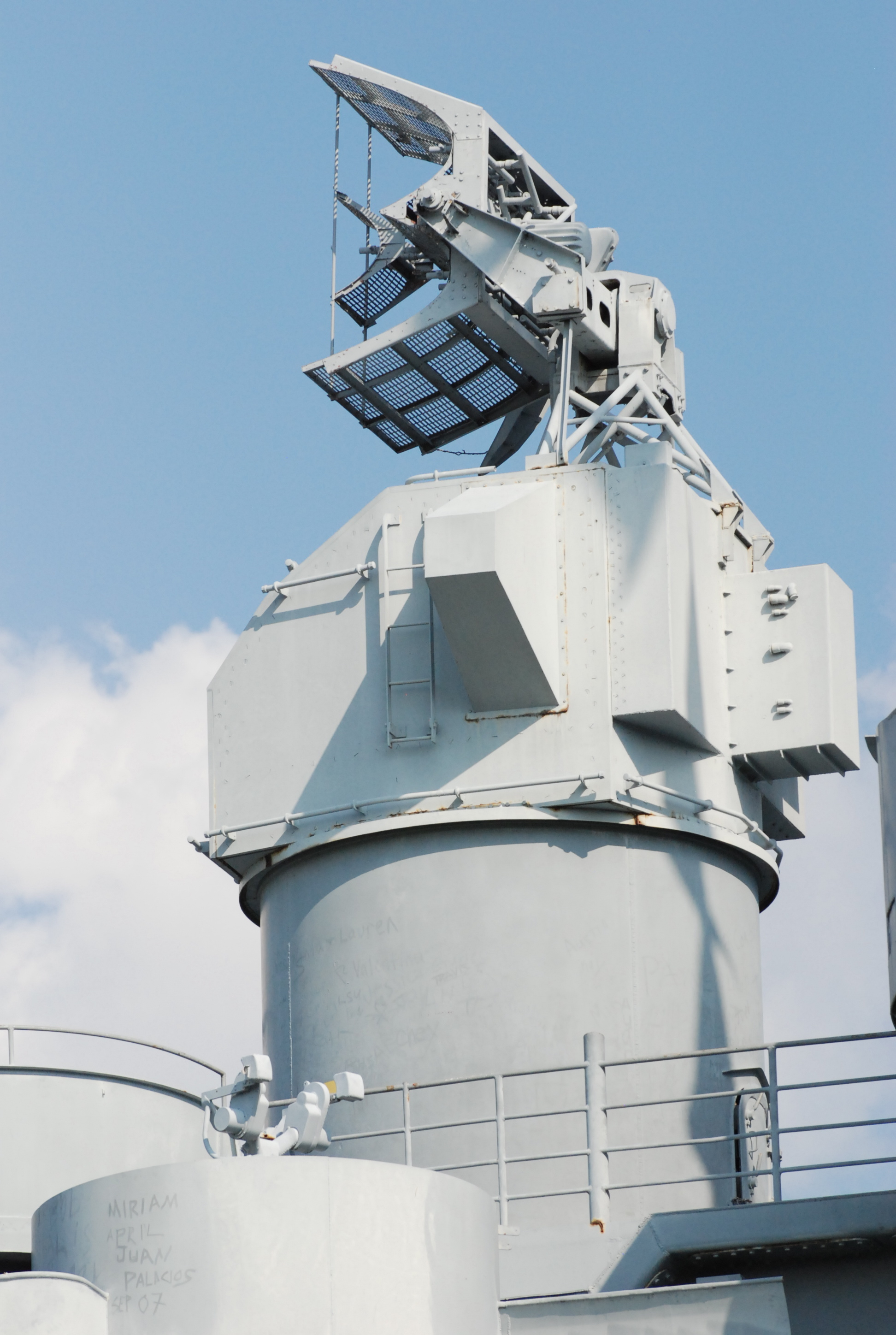 USS Alabama - Mobile, AL